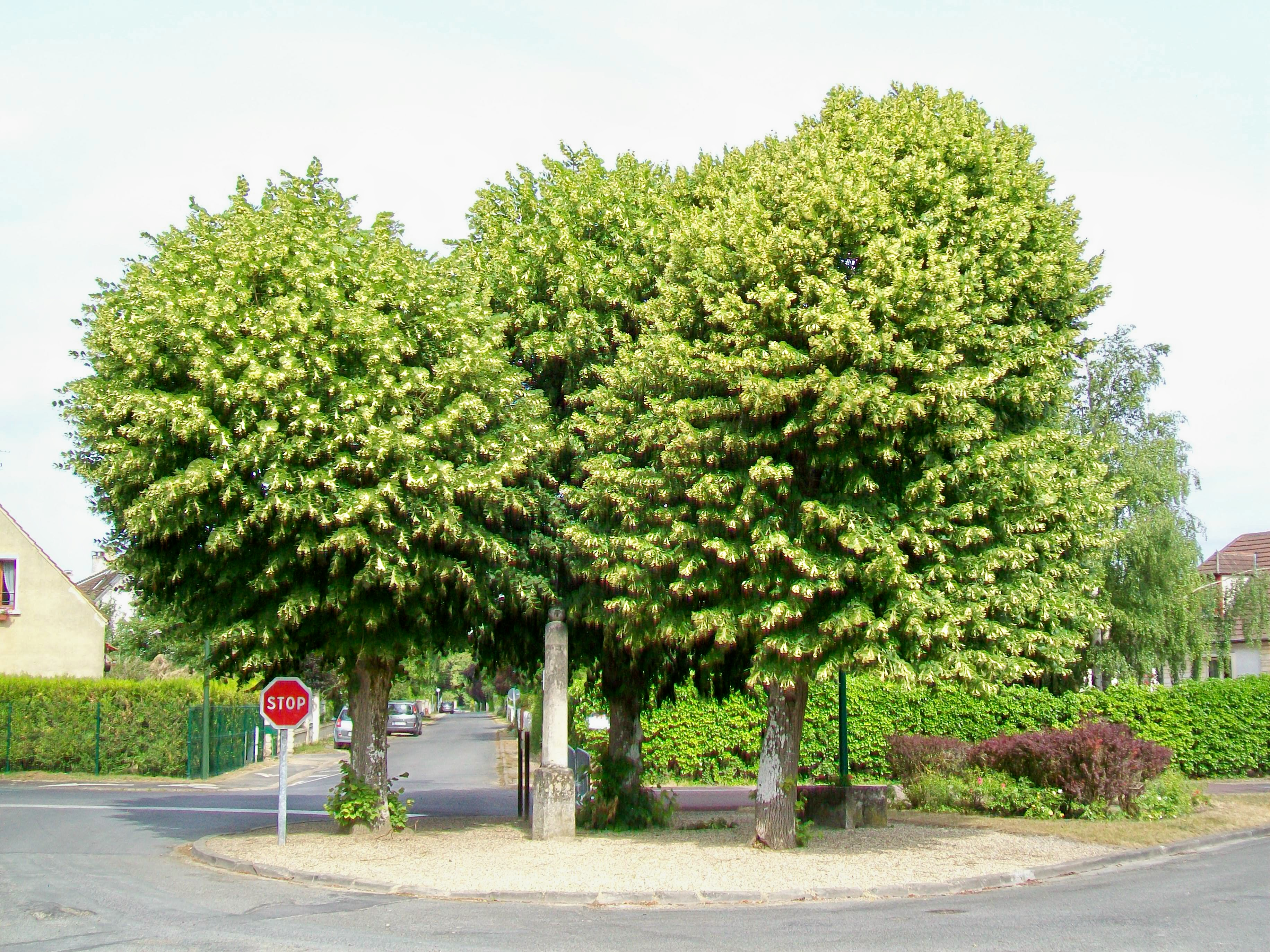 Le calvaire d'Avilly, au sud de la rue du Calvaire, sur le carrefour avec le chemin de la porte du Rond et l'allée d'Ormes, au sud-est du village.